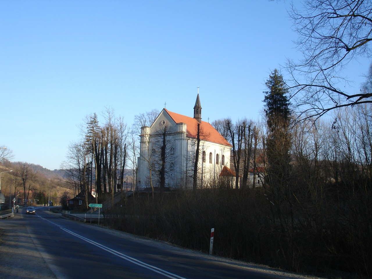 Łaciński kościół widok od strony zachodniej